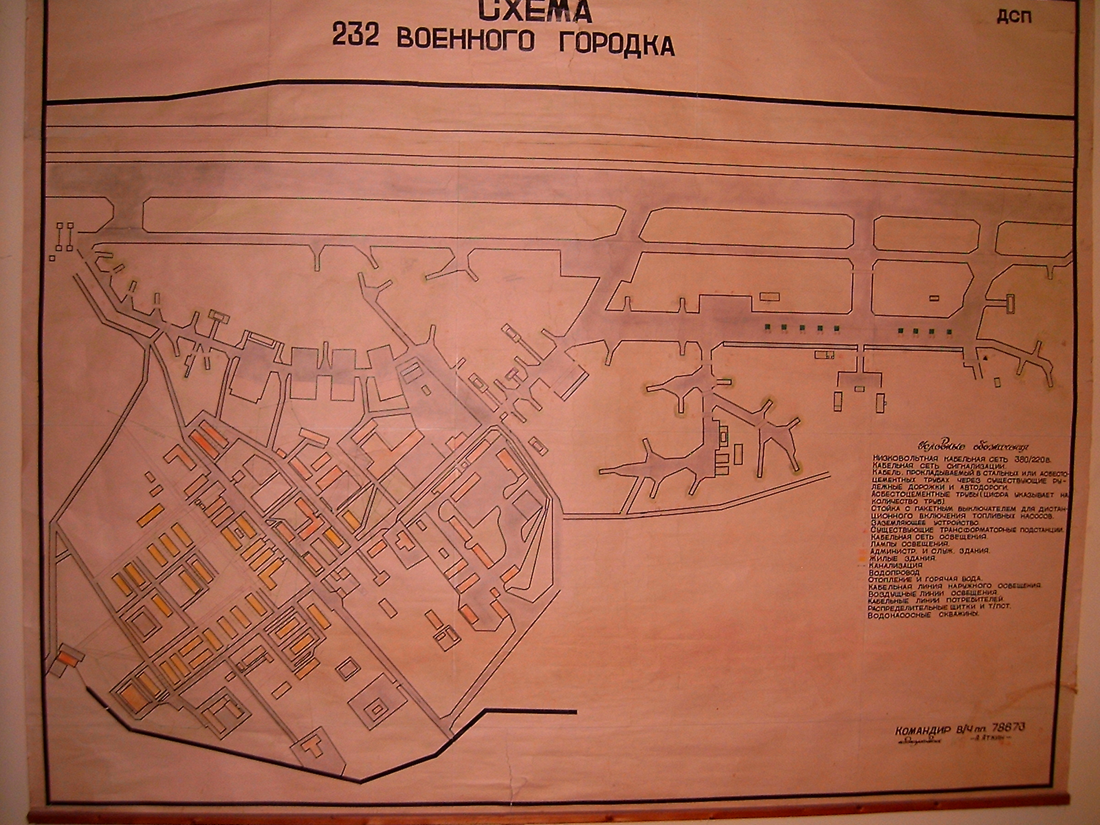 Radziecka mapa wojskowego lotniska pod Szprotawą przechowywana w Muzeum Ziemi Szprotawskiej